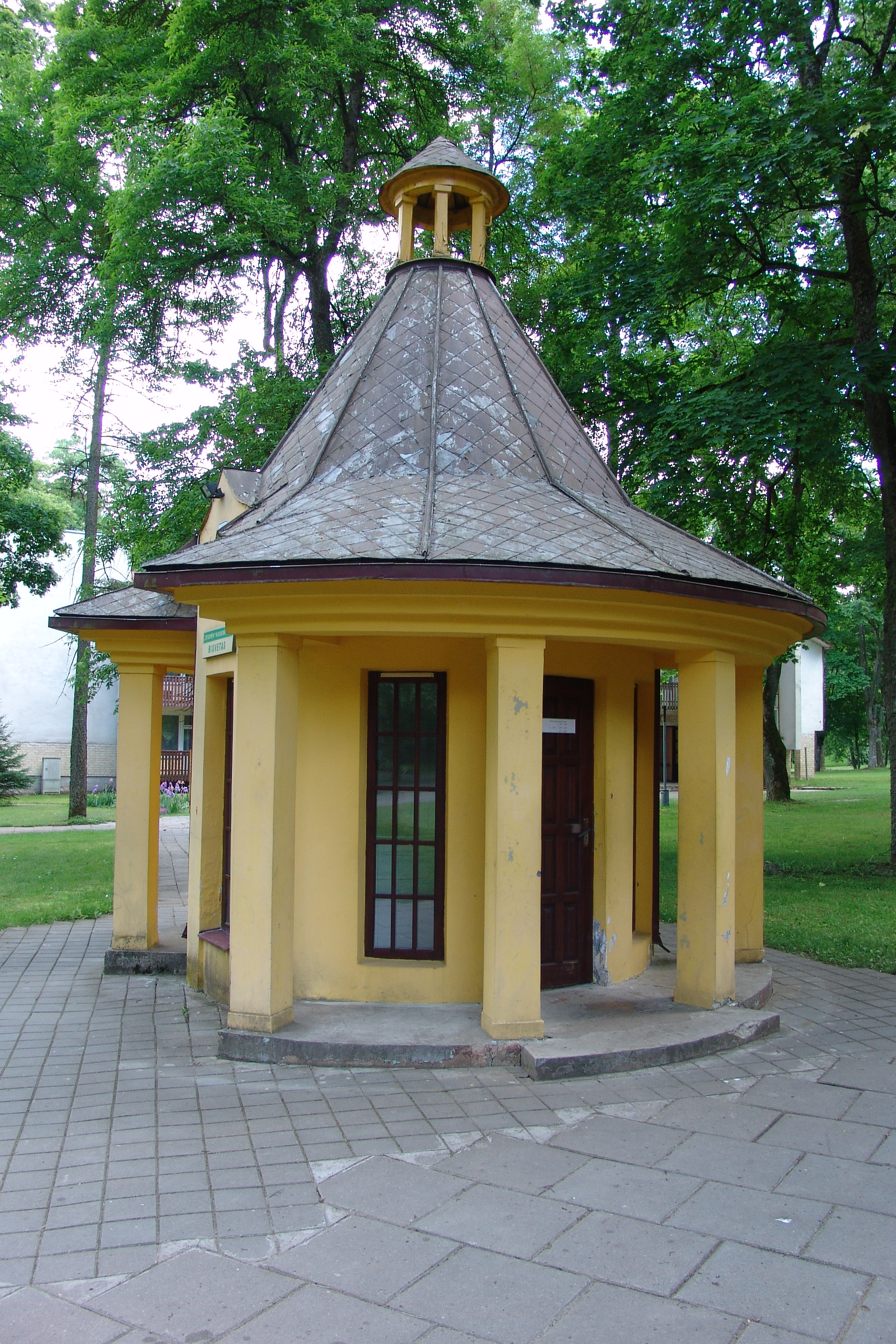 Heilquelle in Bistonas ... leider verschlossen